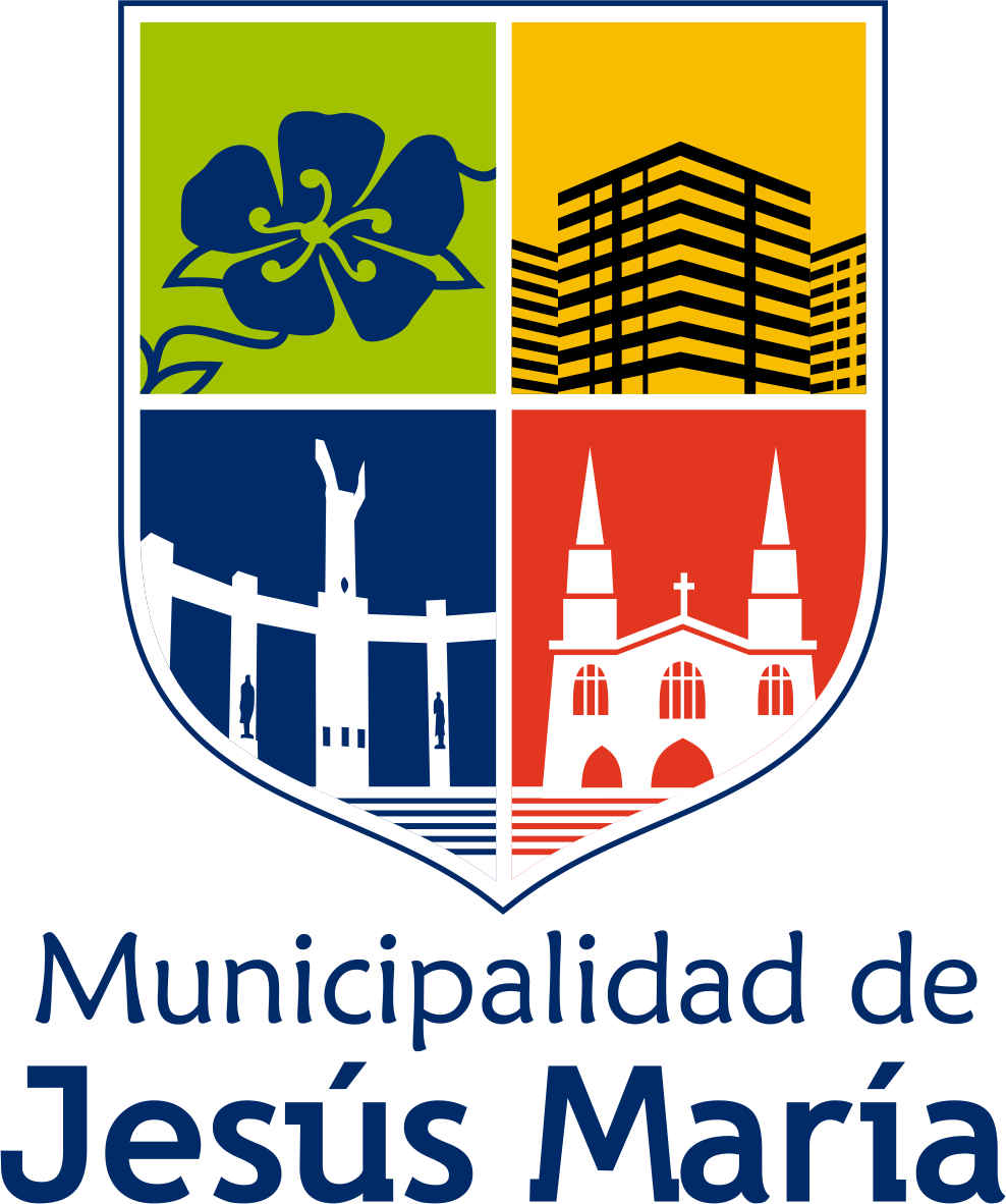 Distrito de Jesús María - Provincia de Lima - Región Lima